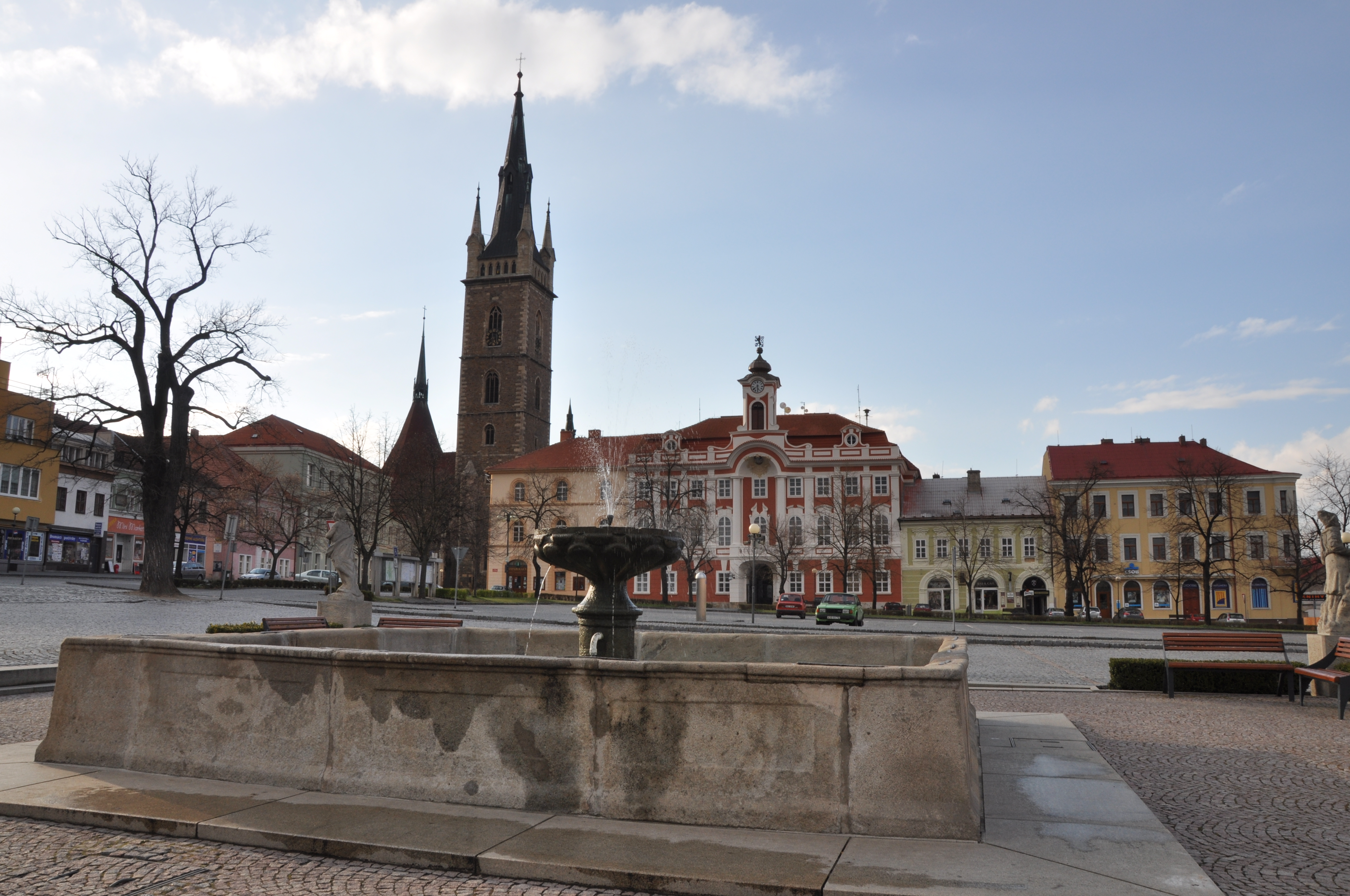 Kamenná čtvercová kašna s fontánou uprostřed postavena na konci 18.století v klasicistní slohu. Po stranách ji obklopují 4 sochy múz. Náměstí Jana Žižky z Trocnova. Město Čáslav. Středočeský kraj. Czech Republik.